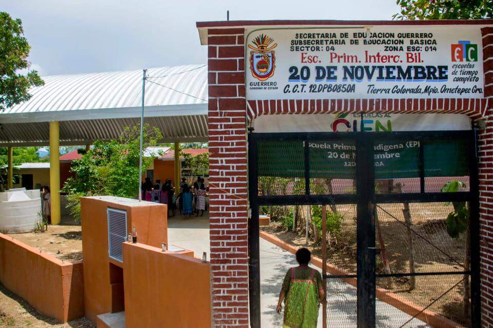 Srpskohrvatski / српскохрватски: Tierra Colorada Municipio Ometepec Guerrero México